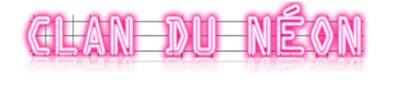 logo clan du néon inventé à paris